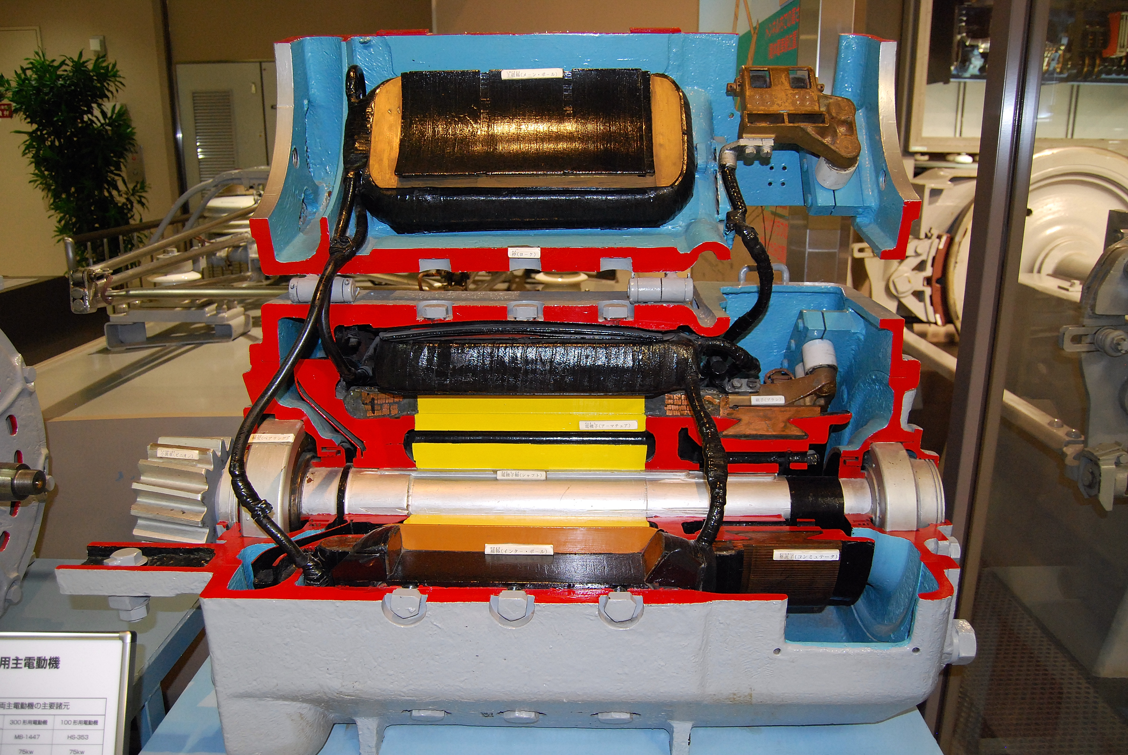 営団地下鉄（現東京メトロ）100形のDCモーター（地下鉄博物館で撮影）